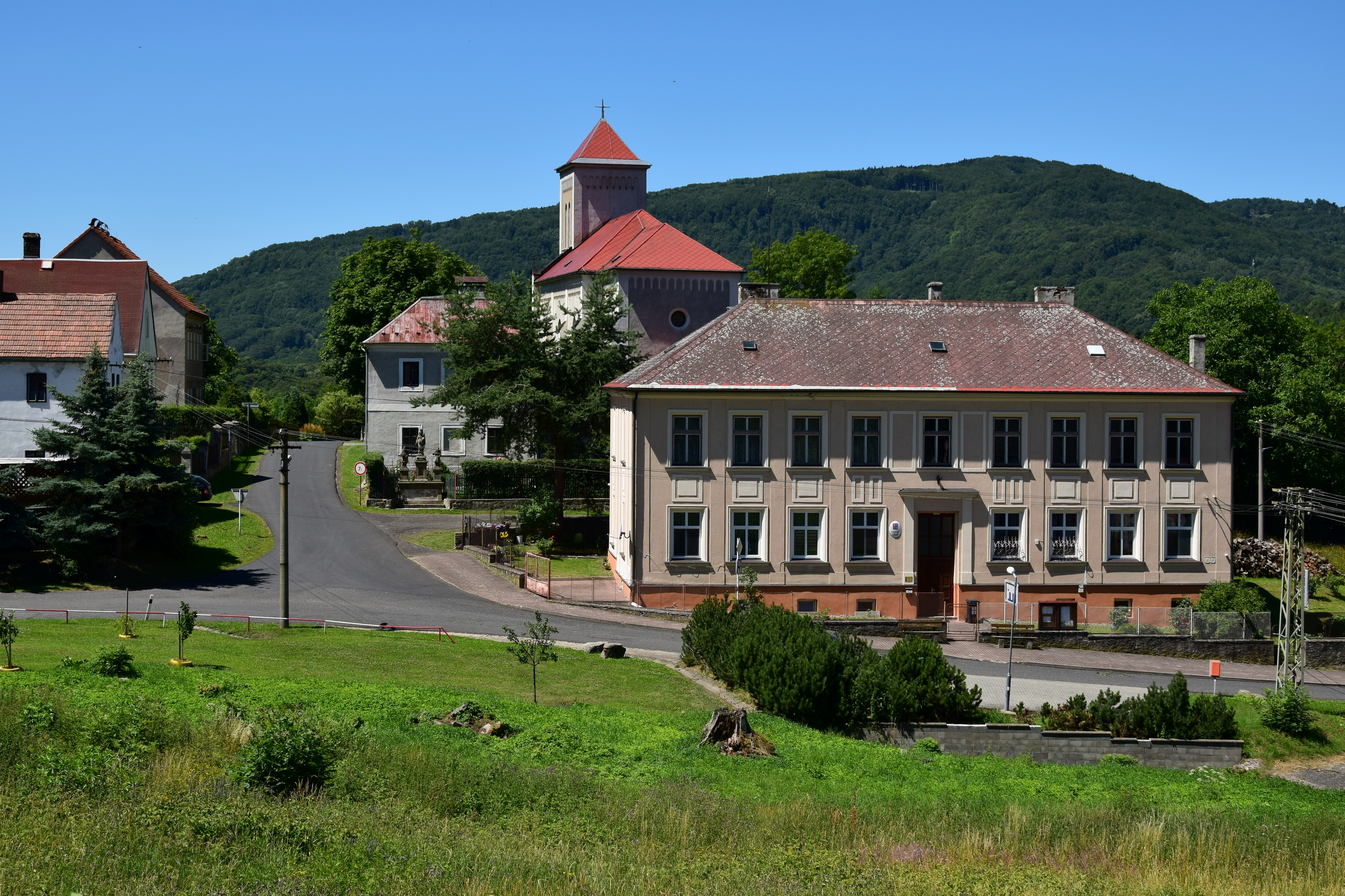 Okounov – obecní úřad s kostelem svatého Vavřince